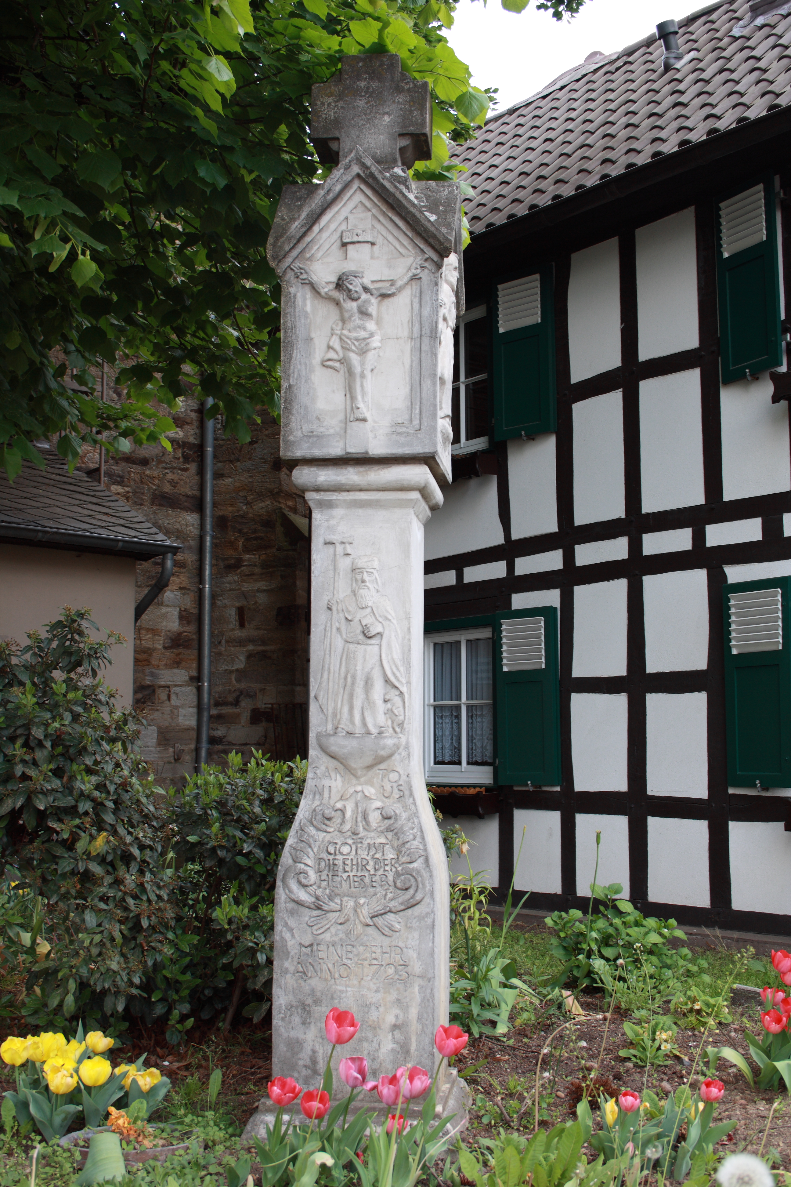 Bildstock neben der katholischen Kapelle St. Antonius und Sebastian in Bad Neuenahr (auch "Hemmesser Kapelle" genannt), Sebastianstraße 77, Darstellung: Kreuzigung und am Schaft der hl. Antonius mit der Inschrift "GOT IST DIE EHR DER HEMESER" und "MEINE ZEHR, ANNO 1723"